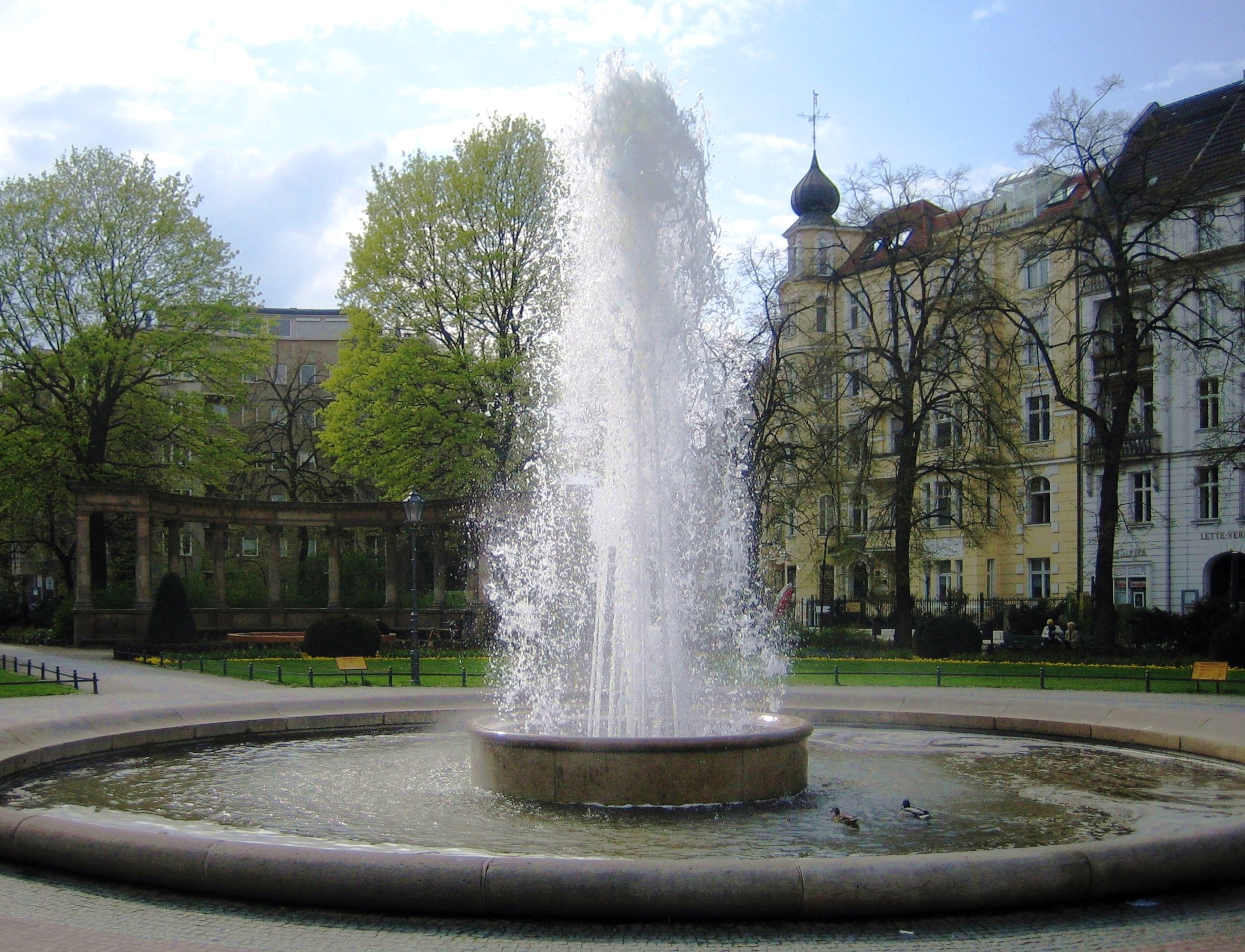 Victoria-Luise-Platz in Berlin-Schöneberg. Fontäne.